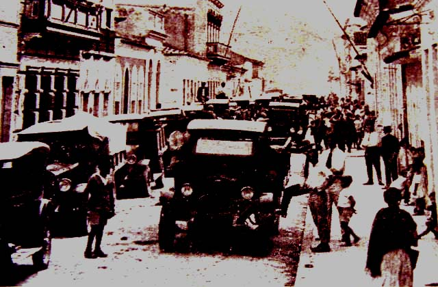 1920 Rua 15 de Novembro, município de Antonina, estado PR. Fonte